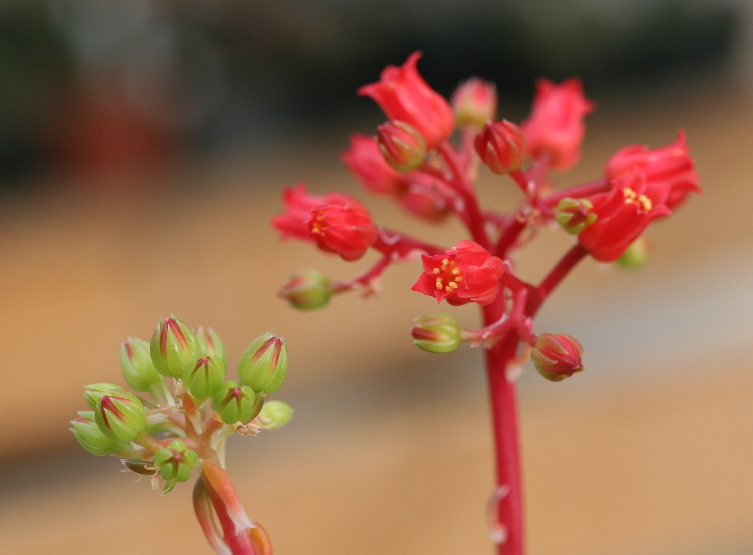 Echeveria affinis in Kultur